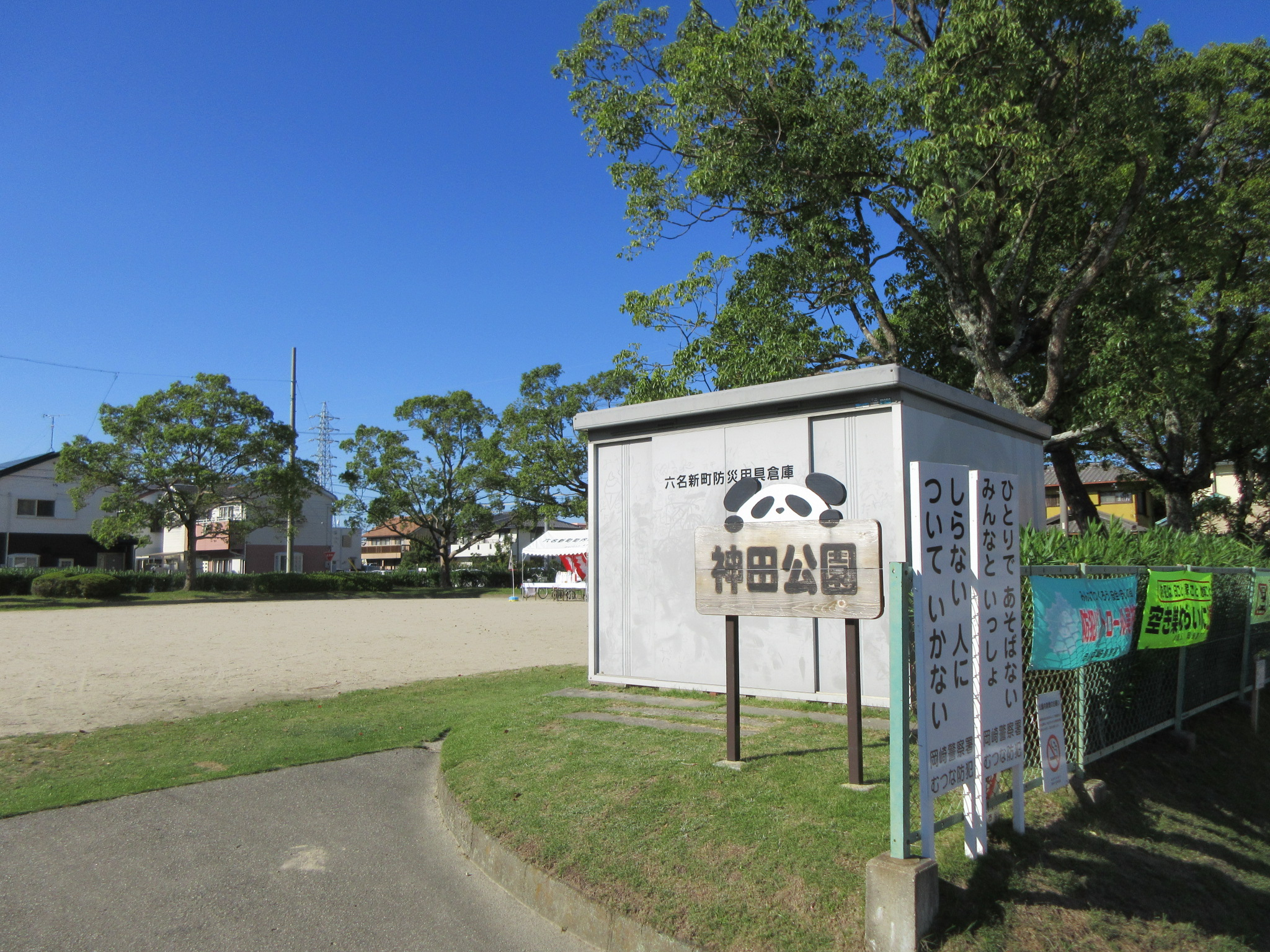 神田公園（岡崎市六名新町）